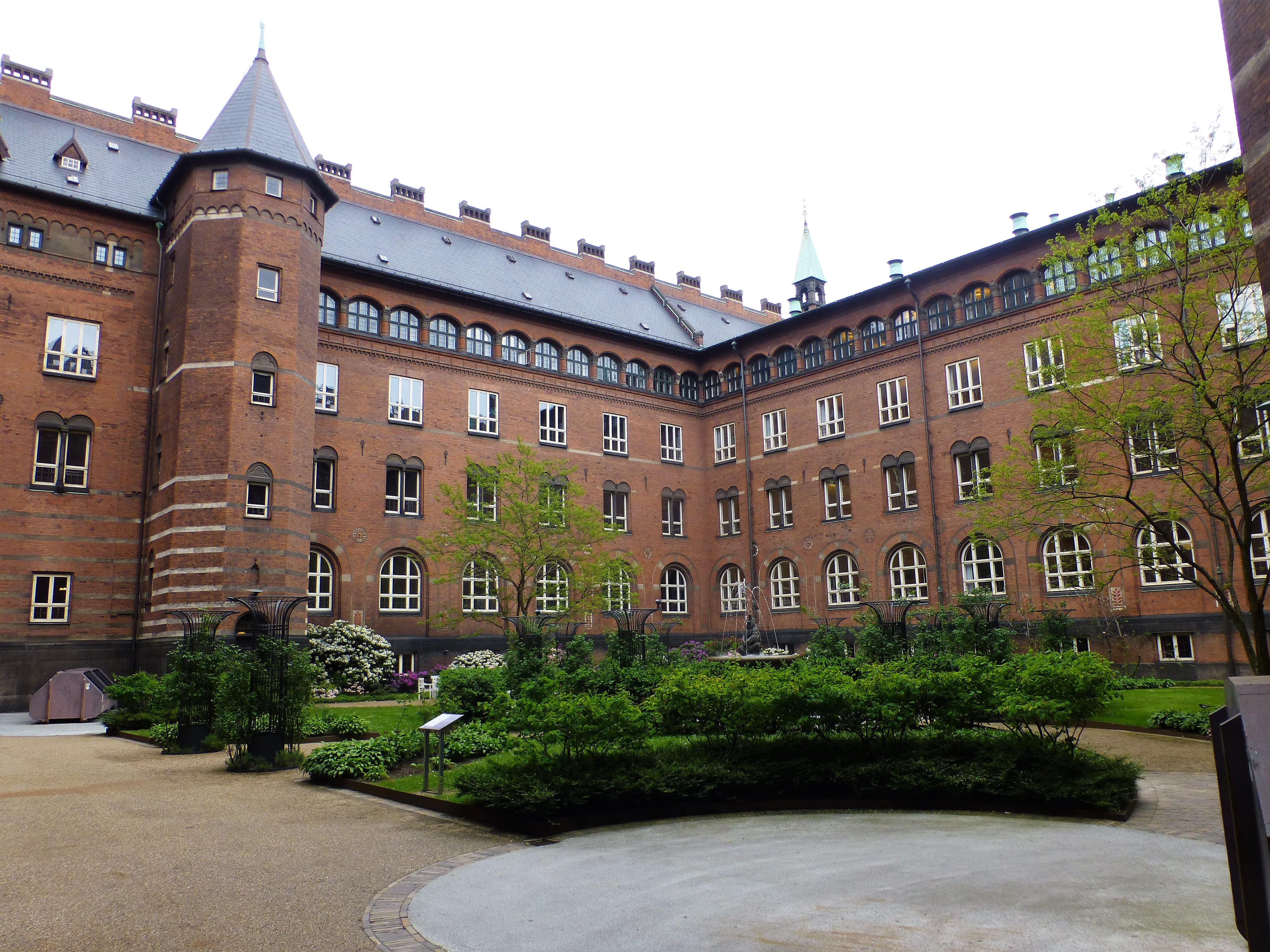 Rådhushaven København